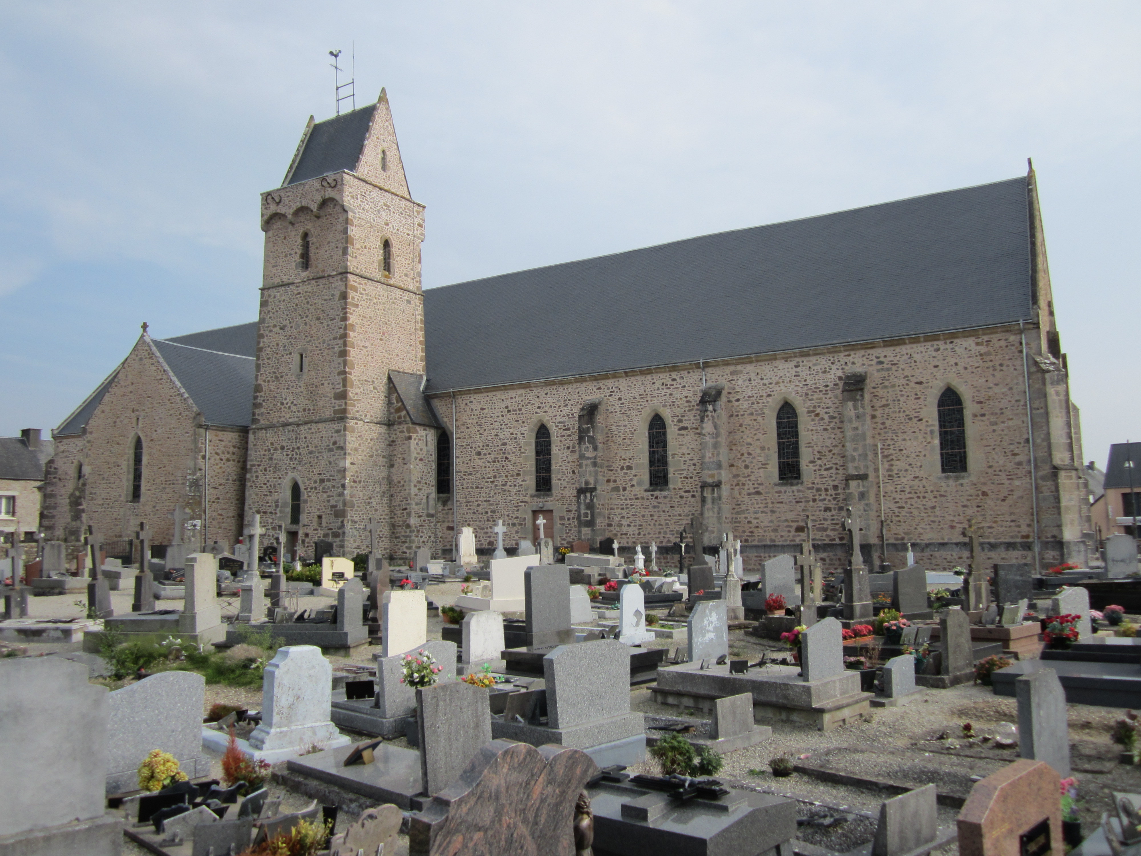 Église Sainte-Trinité de Créances